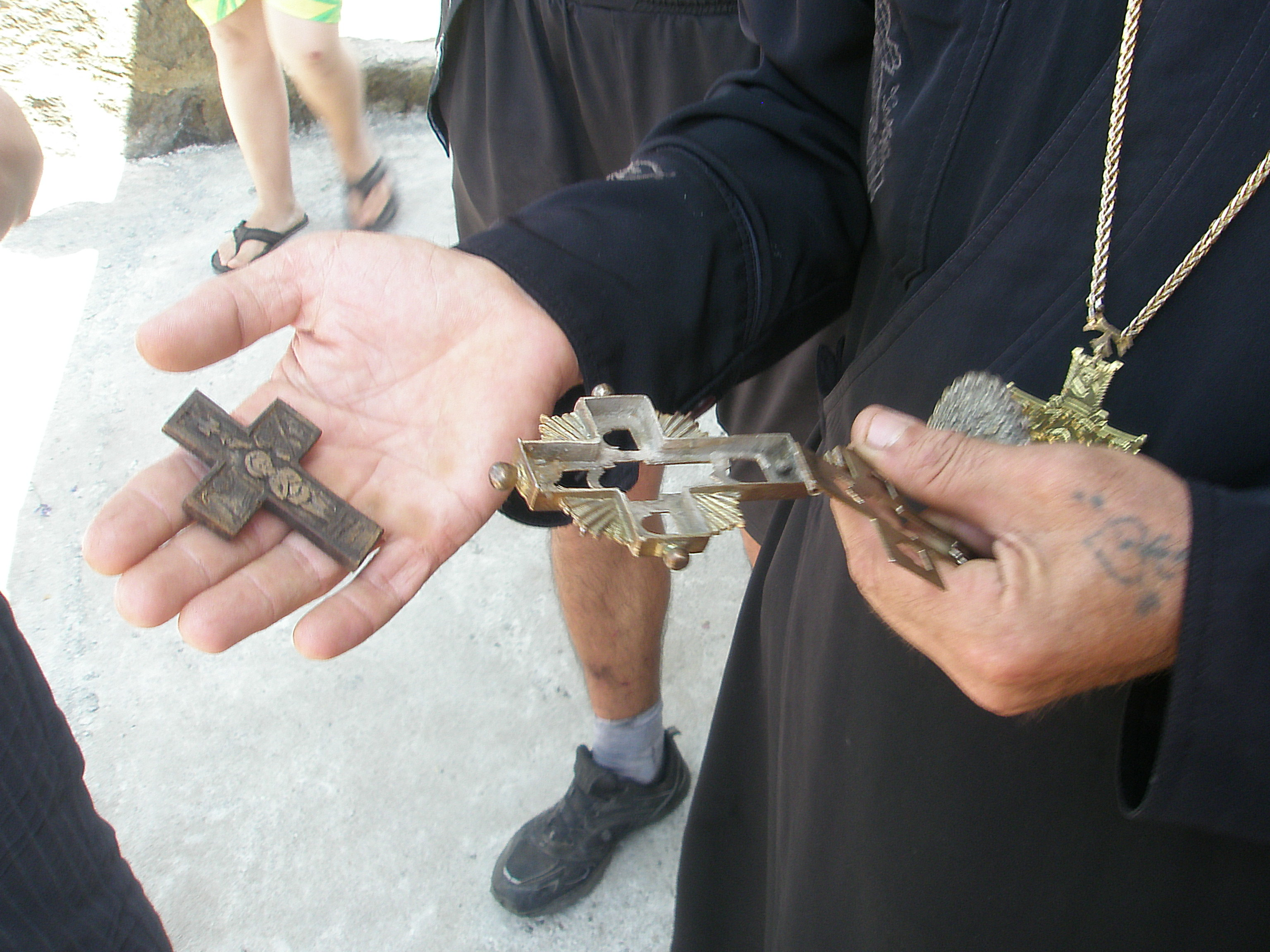 Кръст намерен в основите при строежа на новия храм